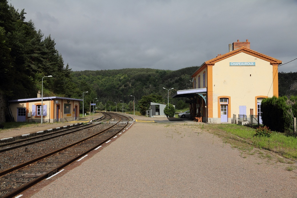 La gare de Chapeauroux en août 2011, Lozère, France.